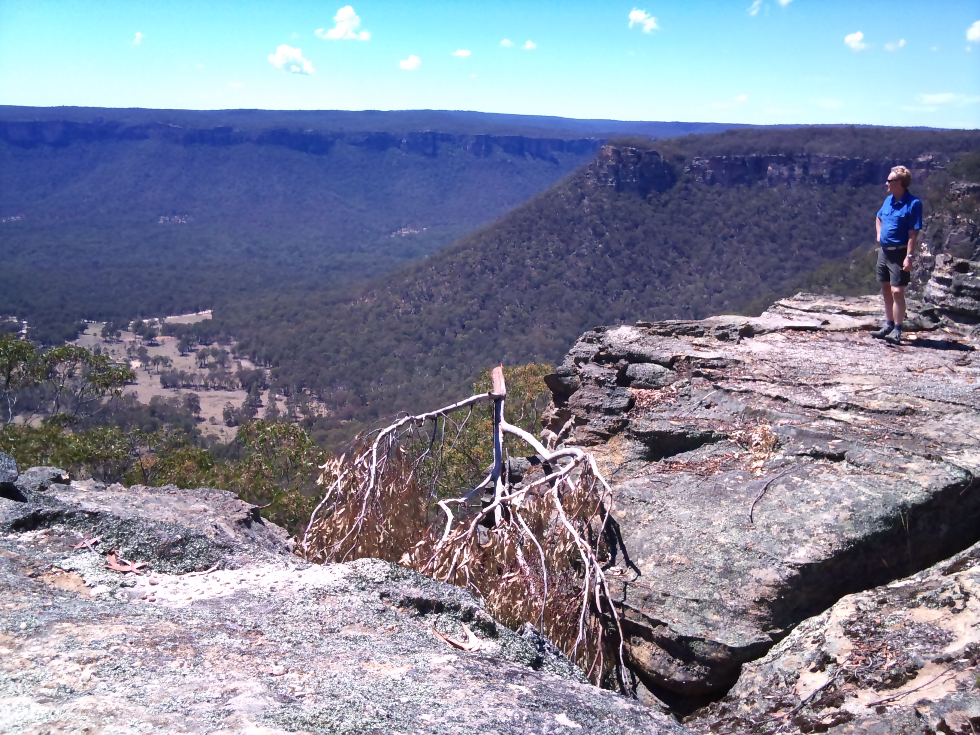 View